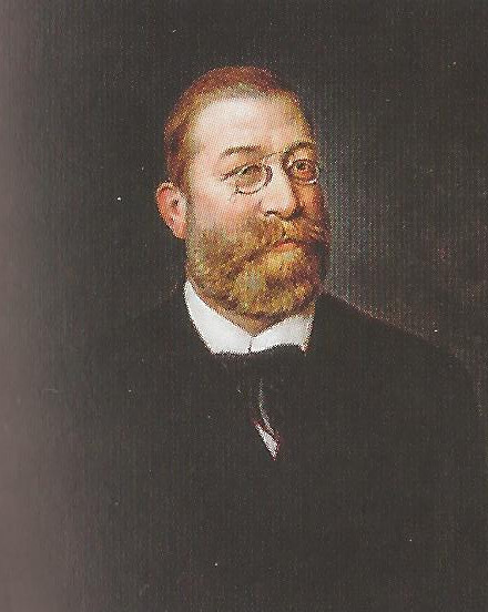 Porträt von Leander Ditscheiner (1839–1905), Rektor der Technischen Hochschule Wien